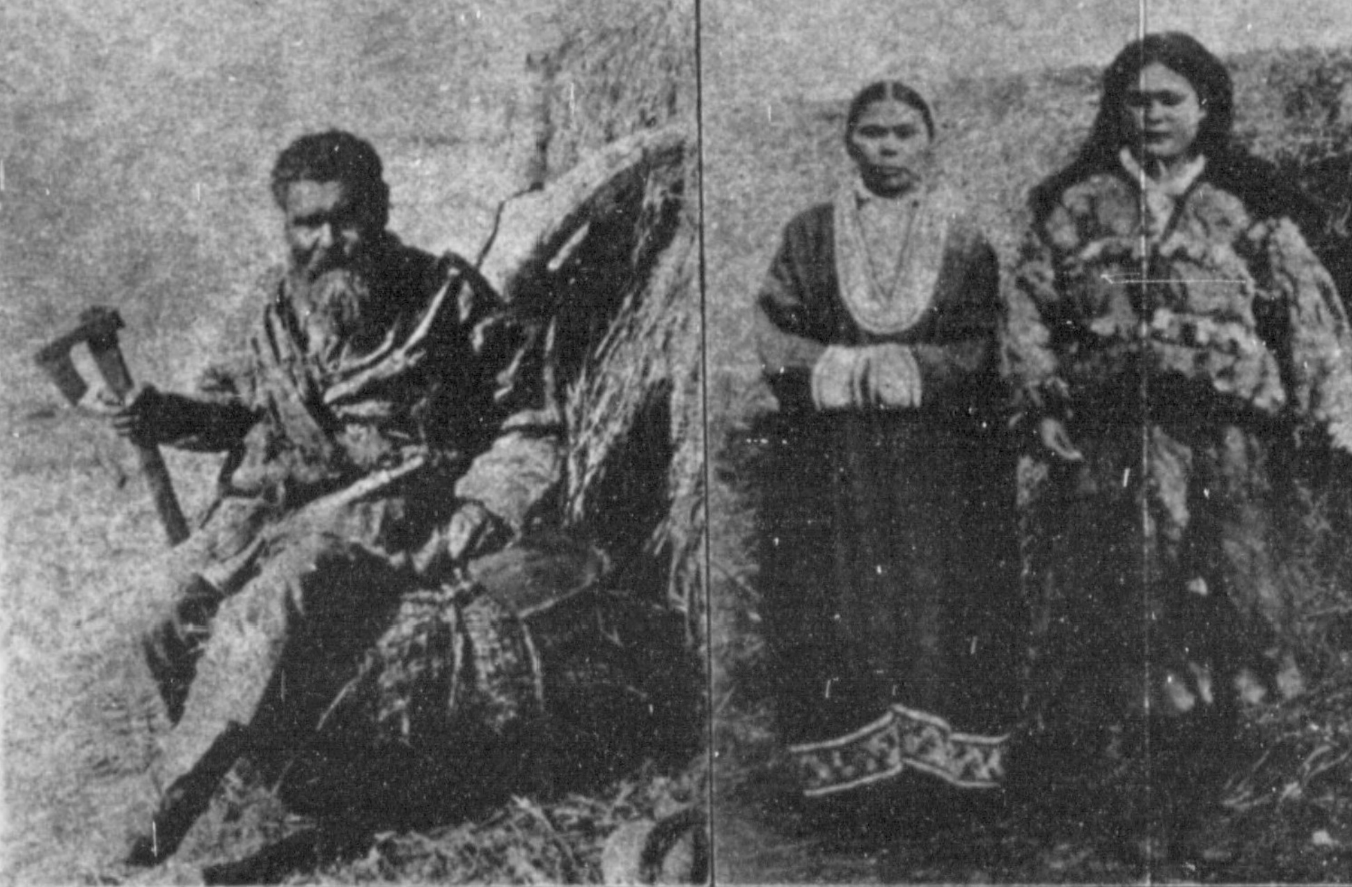 千島アイヌの男性・女性を写した写真